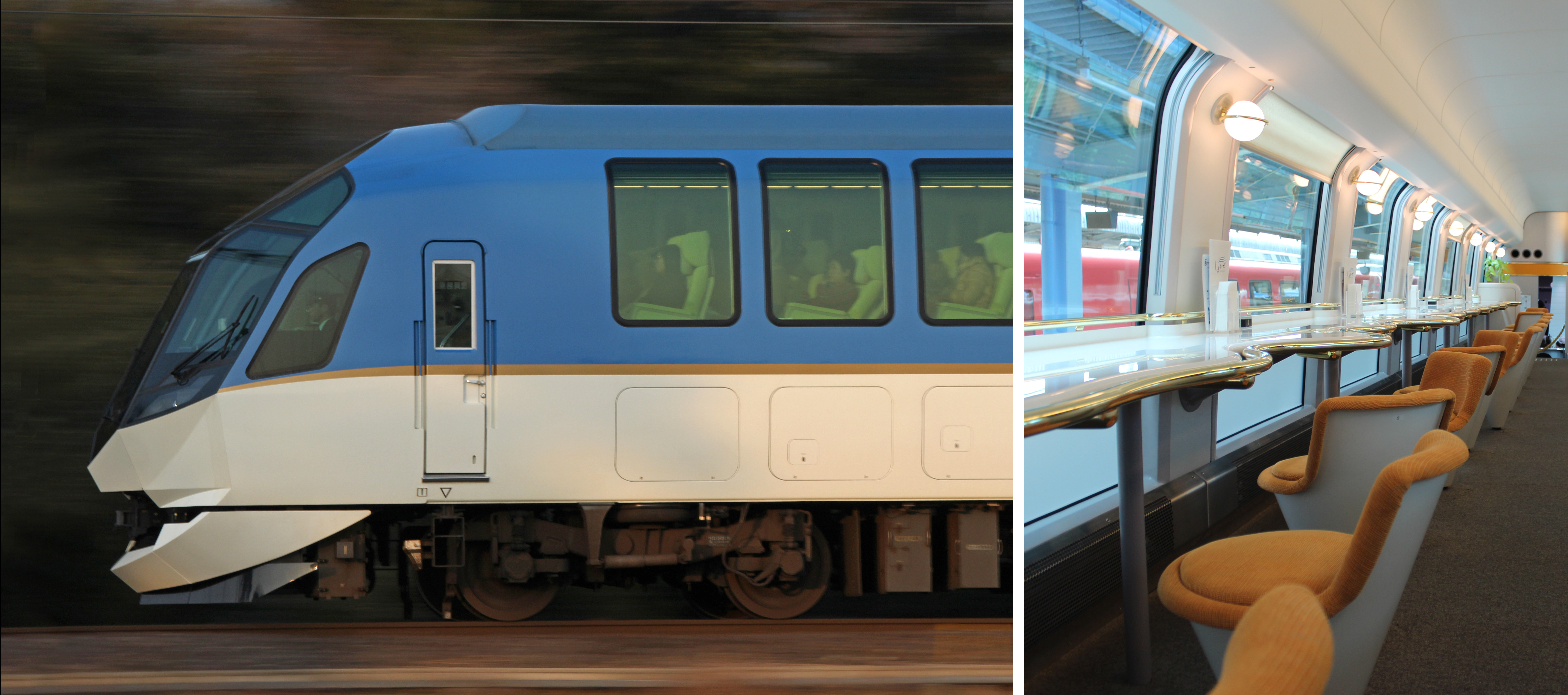 近鉄50000系 イメージ写真